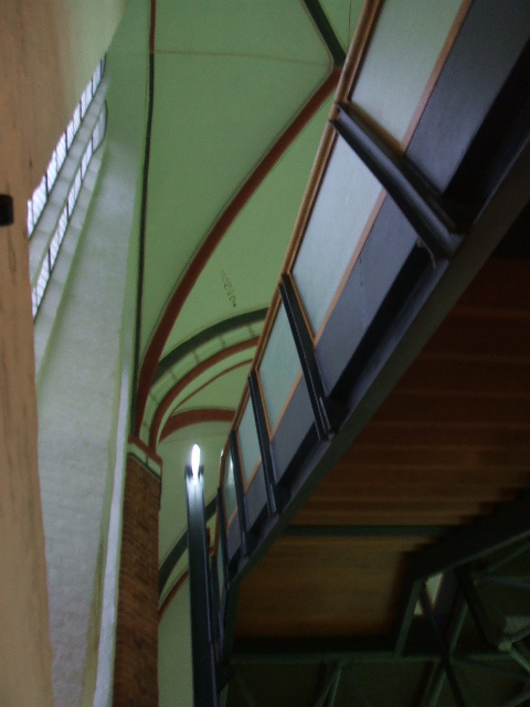 Trägerkonstruktion im Meeresmsueum